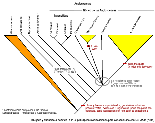 Árbol filogenético consensuado al año 2006 mostrando los diferentes grupos monofiléticos conocidos de angiospermas, y las relaciones conocidas entre ellos.